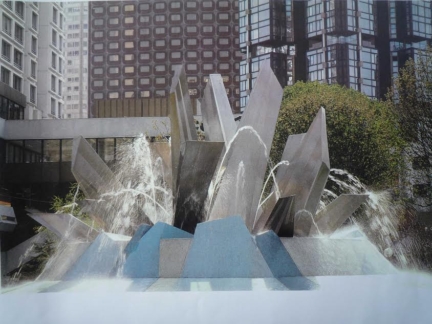 Artiste Jean Yves Lechevallier